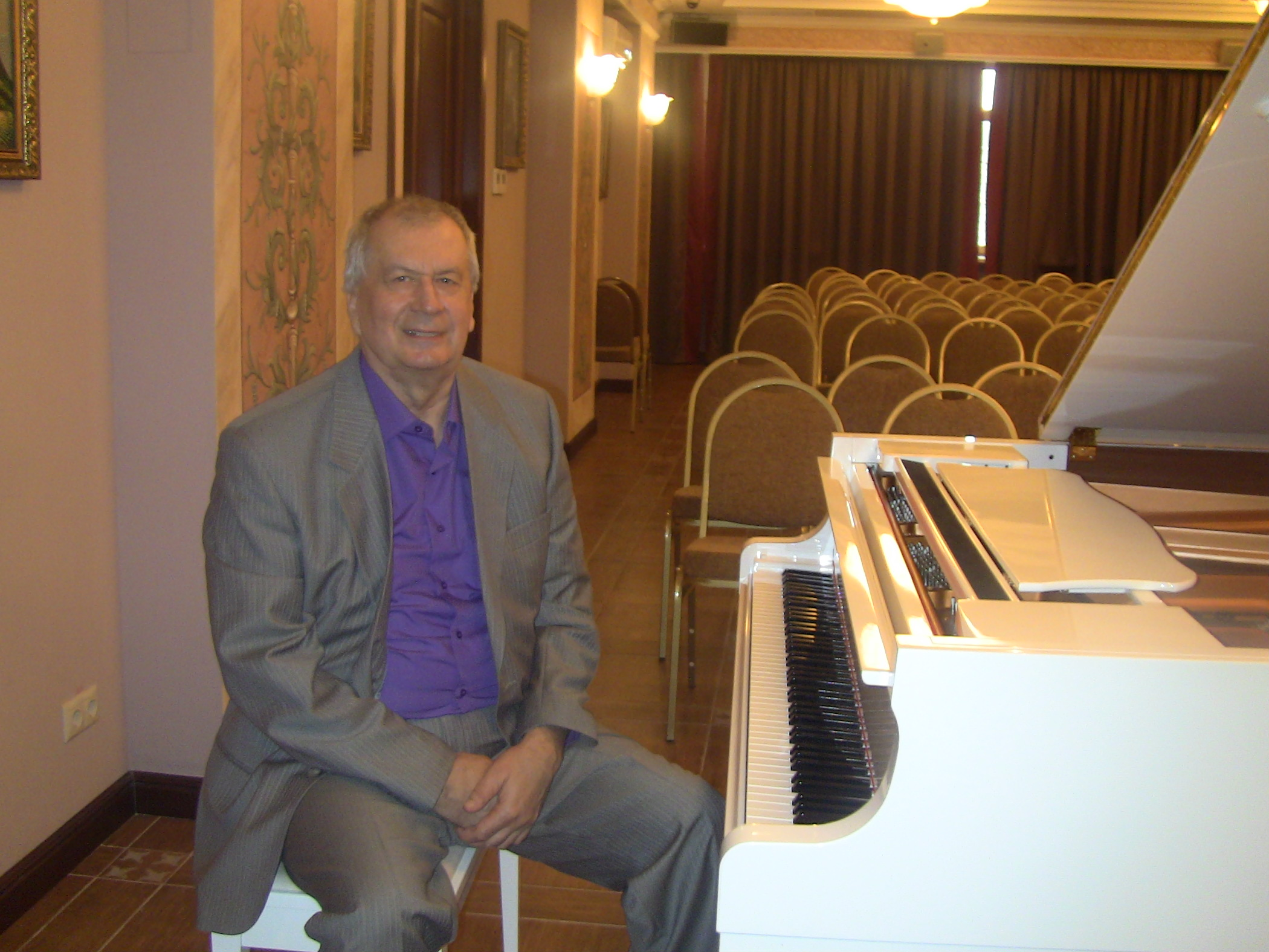 Маркелов, Юрий Николаевич